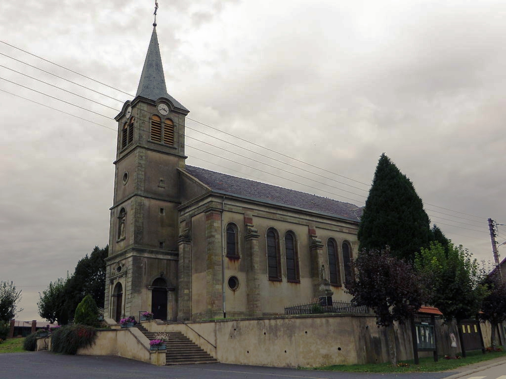 Virming eglise